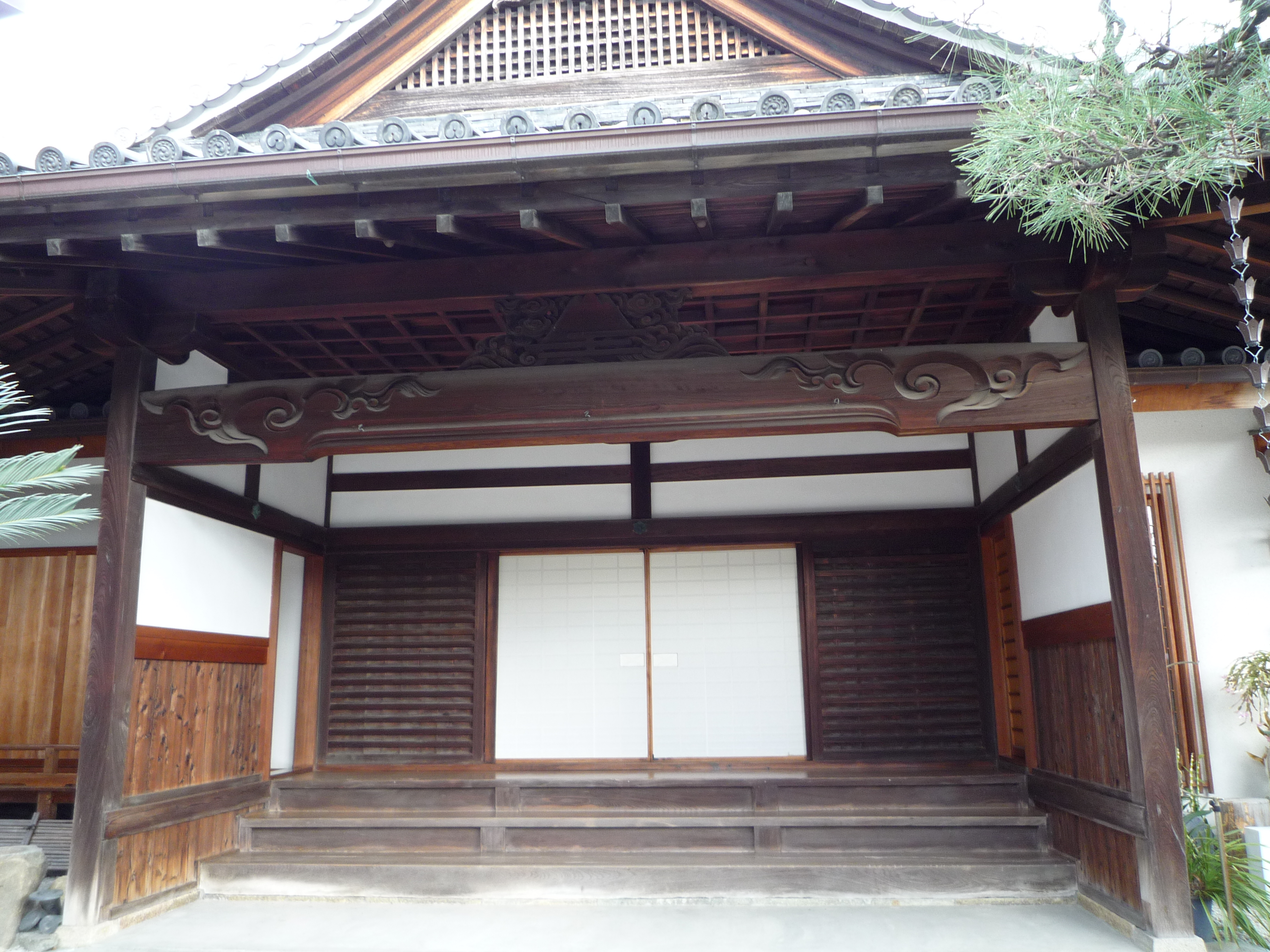 報恩寺（大阪府豊中市）の麻田陣屋表玄関（移築）